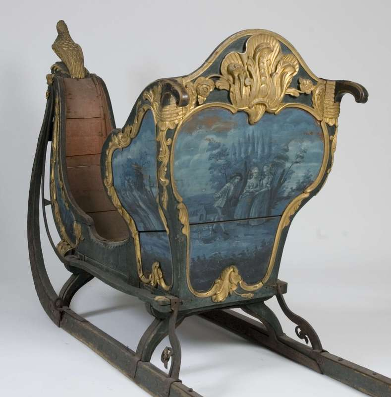 Slede, spisslede. Kunstner: Peder Pedersen Aadnes. Brukssted; ukjent sted. Hestekjøretøy. Lengde (Ca.): 220 cm. Motiv: Camaieumaling, figurer i landskap